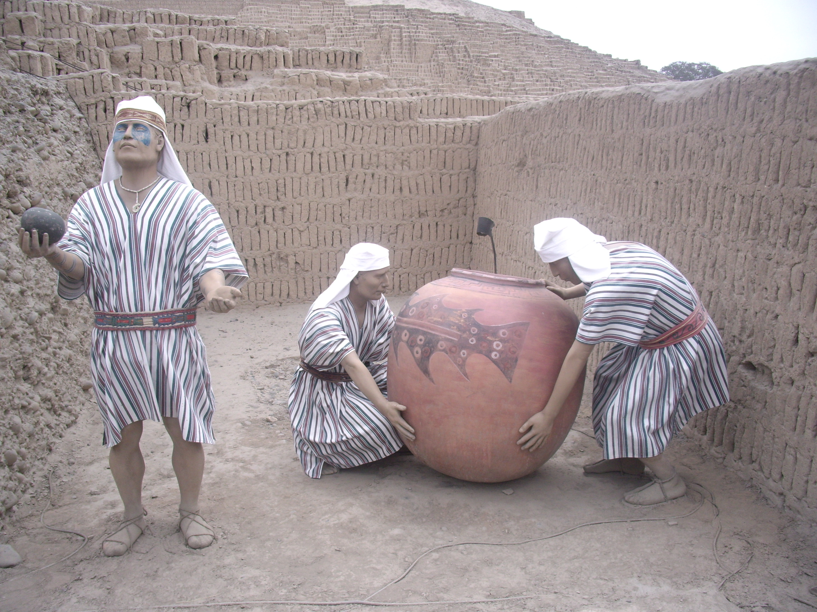 Lloc arqueologic de Huaca Pucllana (Miraflores, Lima)